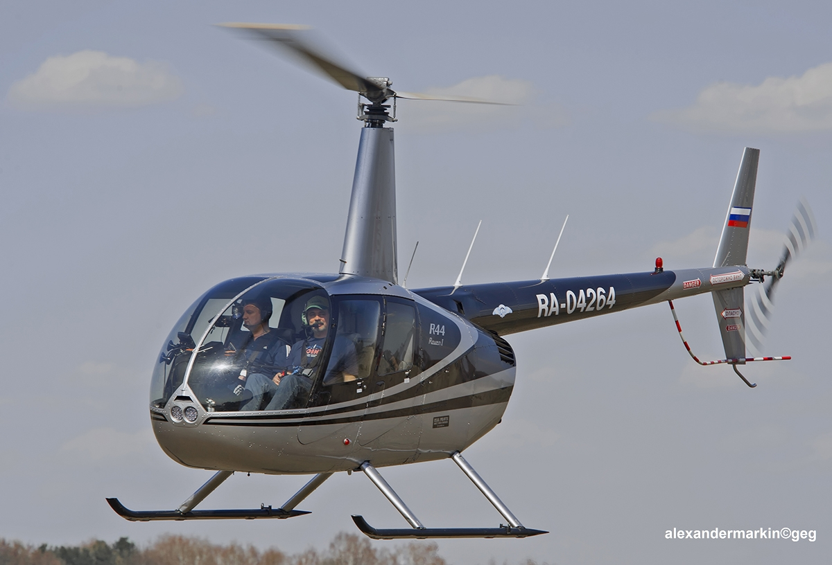 Pilot R44 Michael Farikh. R44 RA-04264